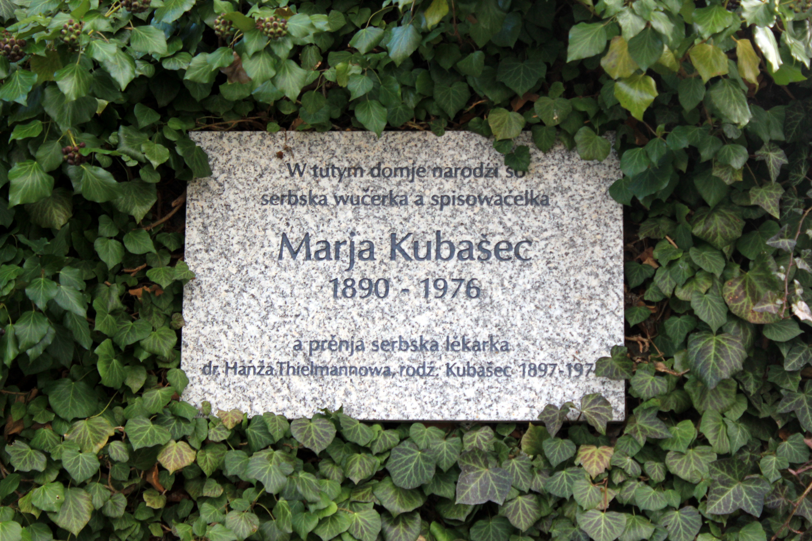 Hornjoserbsce: Wopomnjenska tafla při ródnym domje Marje Kubašec w Chasowje.